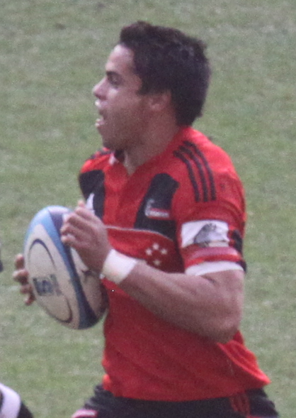 Crusaders vrs Sharks